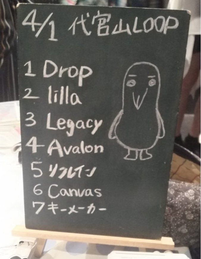 amiinAセトリボード(20180401(1))